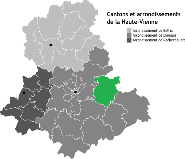 Canton de Saint-Léonard-de-Noblat, Limousin, France en Carte des arrondissements de la Haute-Vienne